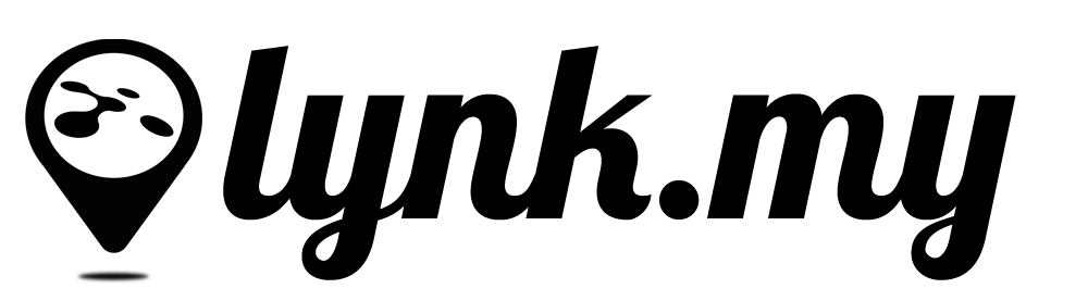 Lynk.my merupakan laman penyedia servis pemendek url yang menjana pendapatan kepada semua pengguna.